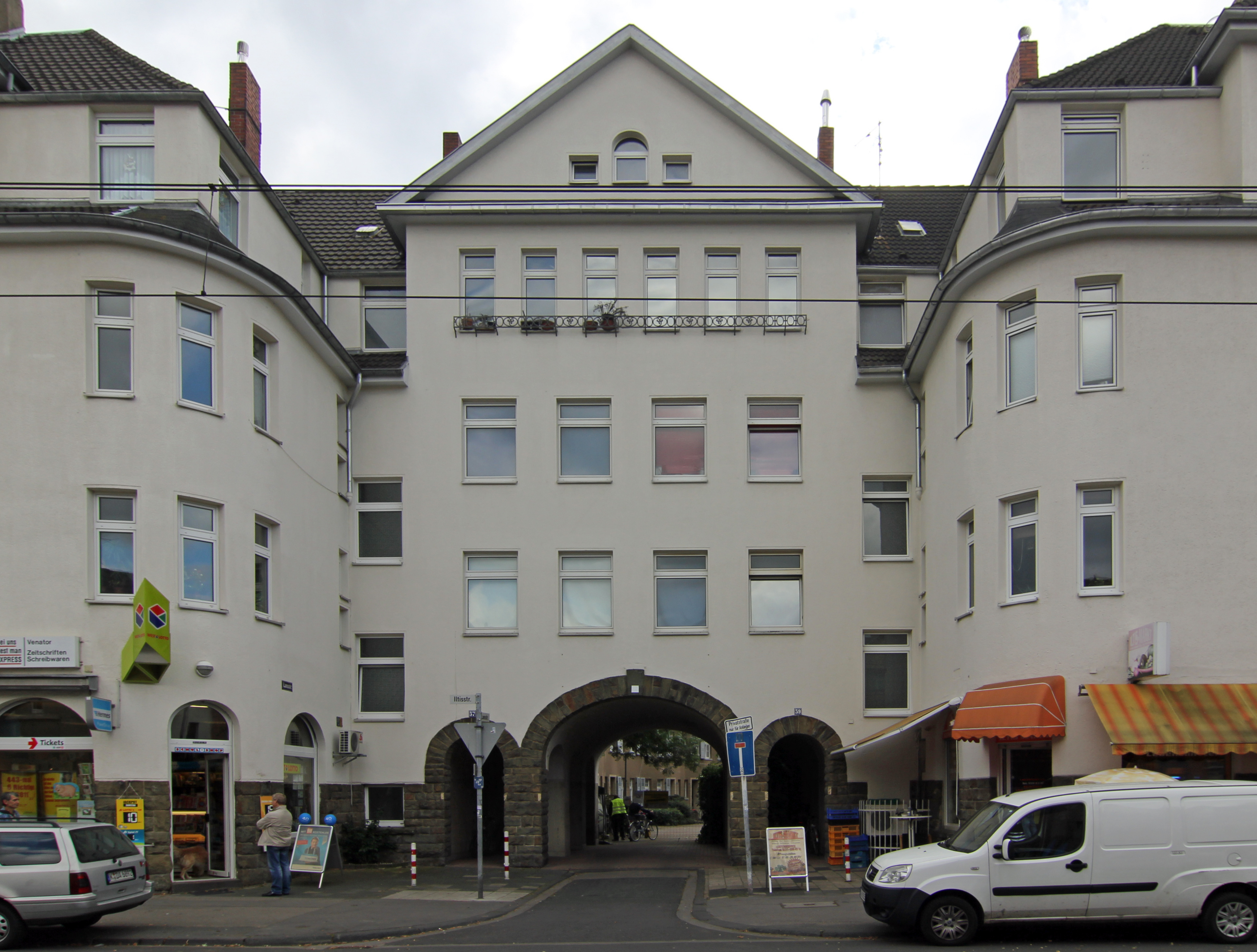 Siedlung der Ehrenfelder Arbeiterwohnungsgenossenschaft, Iltisstr. 53–65. Ausschnitt Iltisstraße 57, 59 (Zufahrt Lansstraße)This is a photograph of an architectural monument.